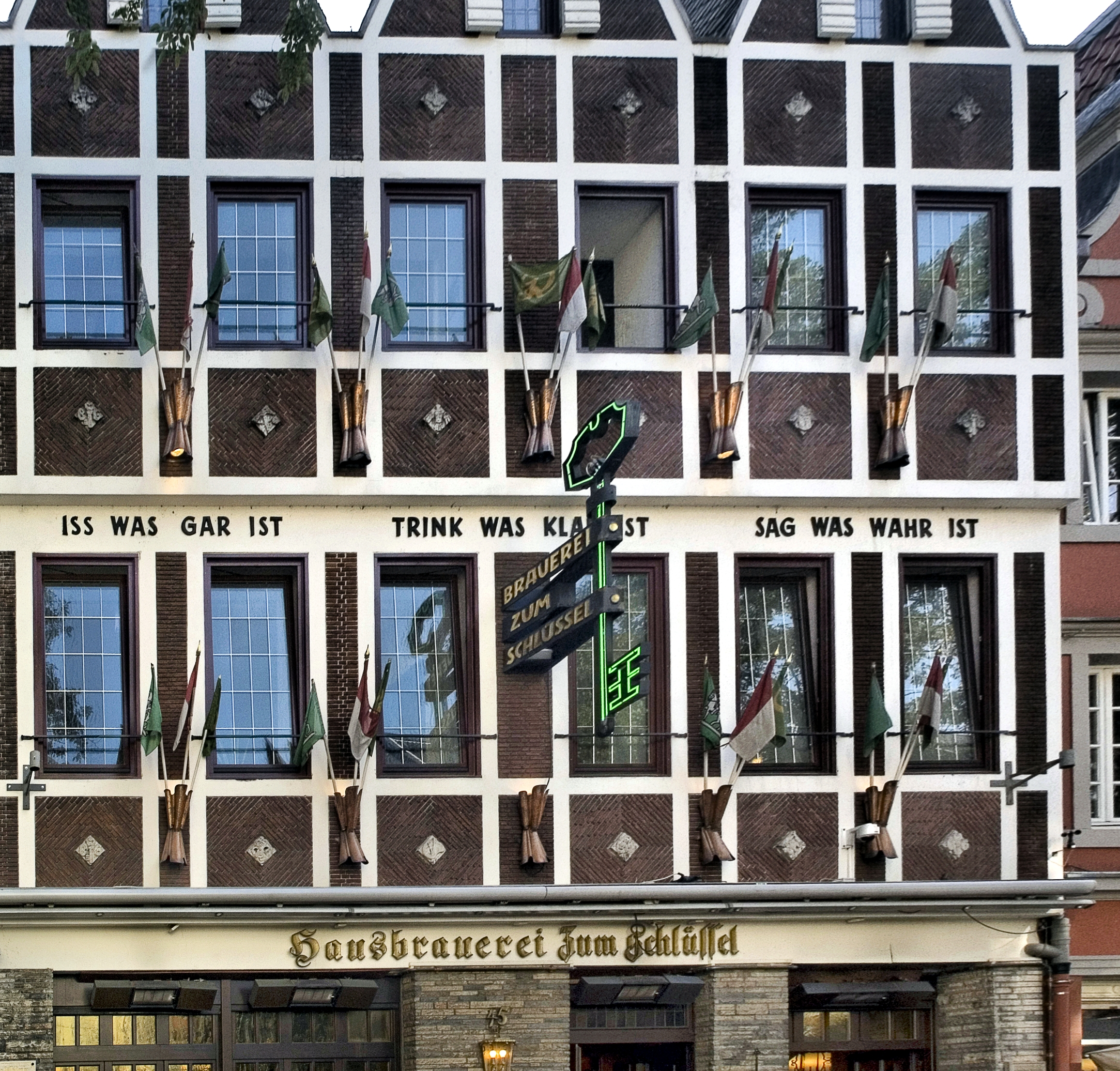 Северный Рейн - Вестфалия, Дюссельдорф - Болькерштрассе